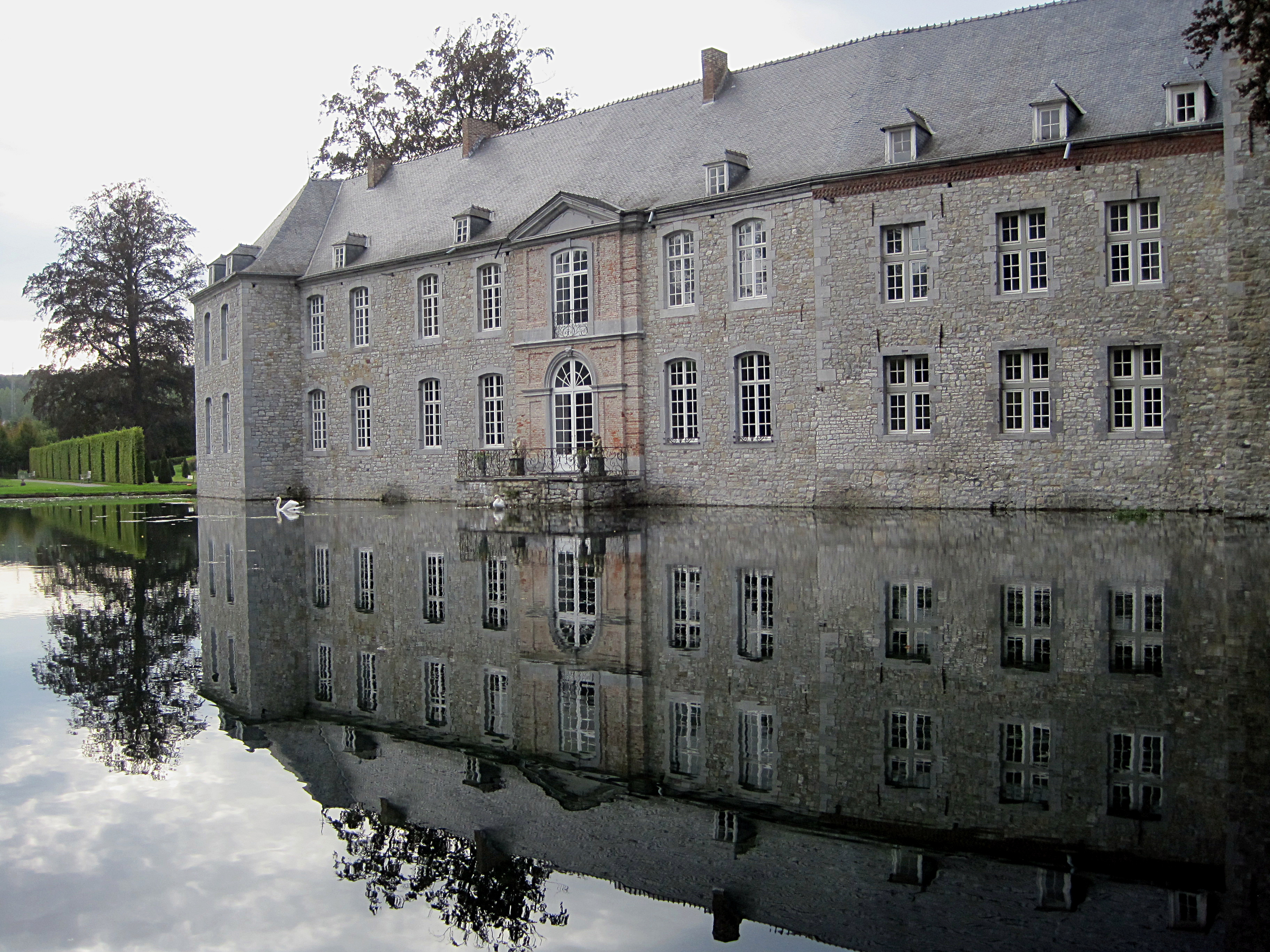 Le château d'Annevoie et son plan d'eau (Belgique).